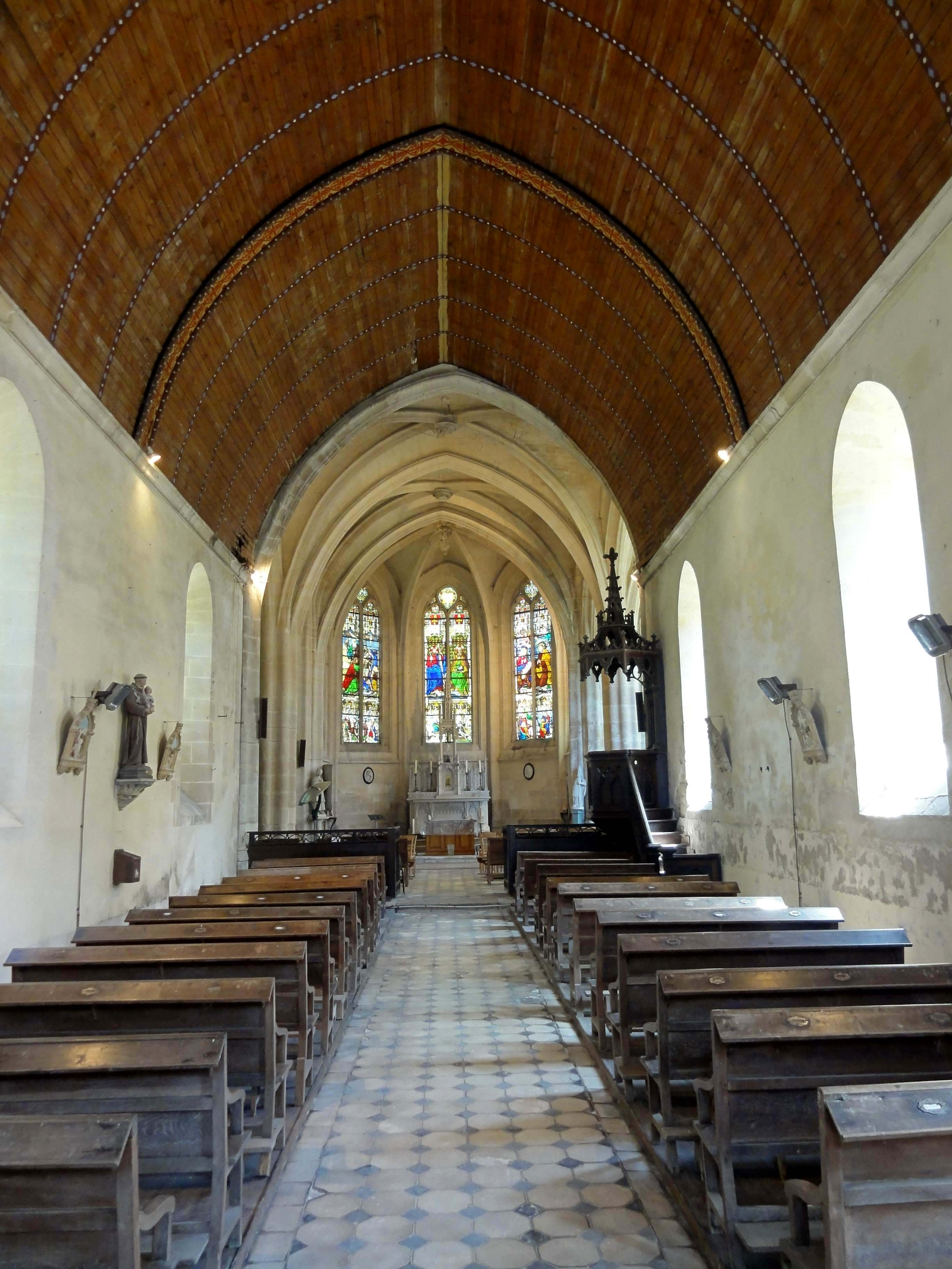 Intérieur de l'église (voir titre).